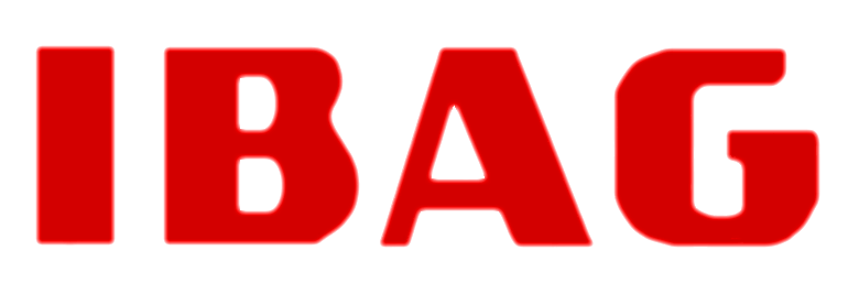 Logo der aus dem Handelsregister gelöschten Internationalen Baumaschinen AG Neustadt, bearbeitet nach einem eigenen Foto von der alten Fabrikhalle in Neustadt (Weinstraße) kein Markenschutz zu ermitteln, Schöpfer des Logos unbekannt